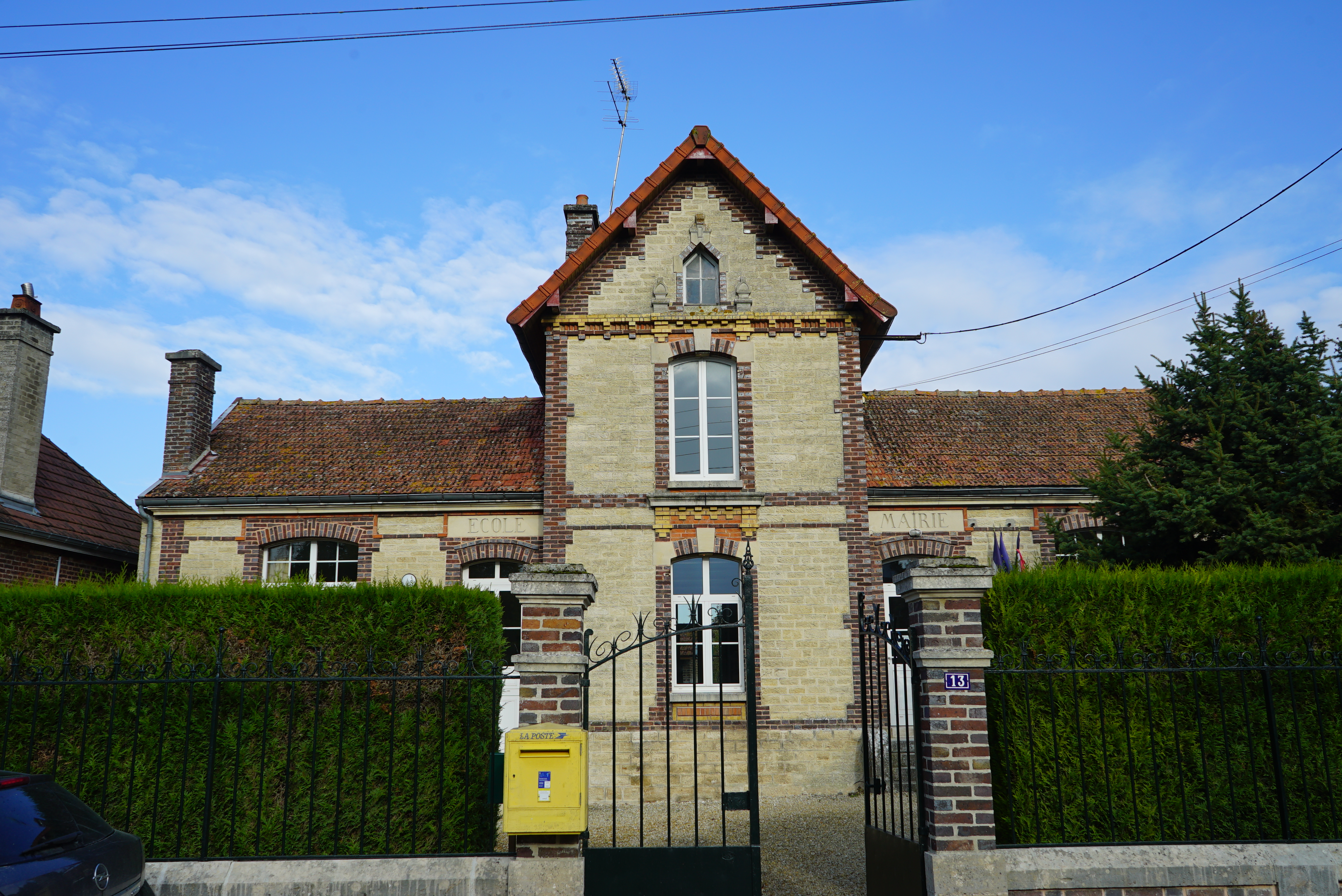 à AUbeterre.